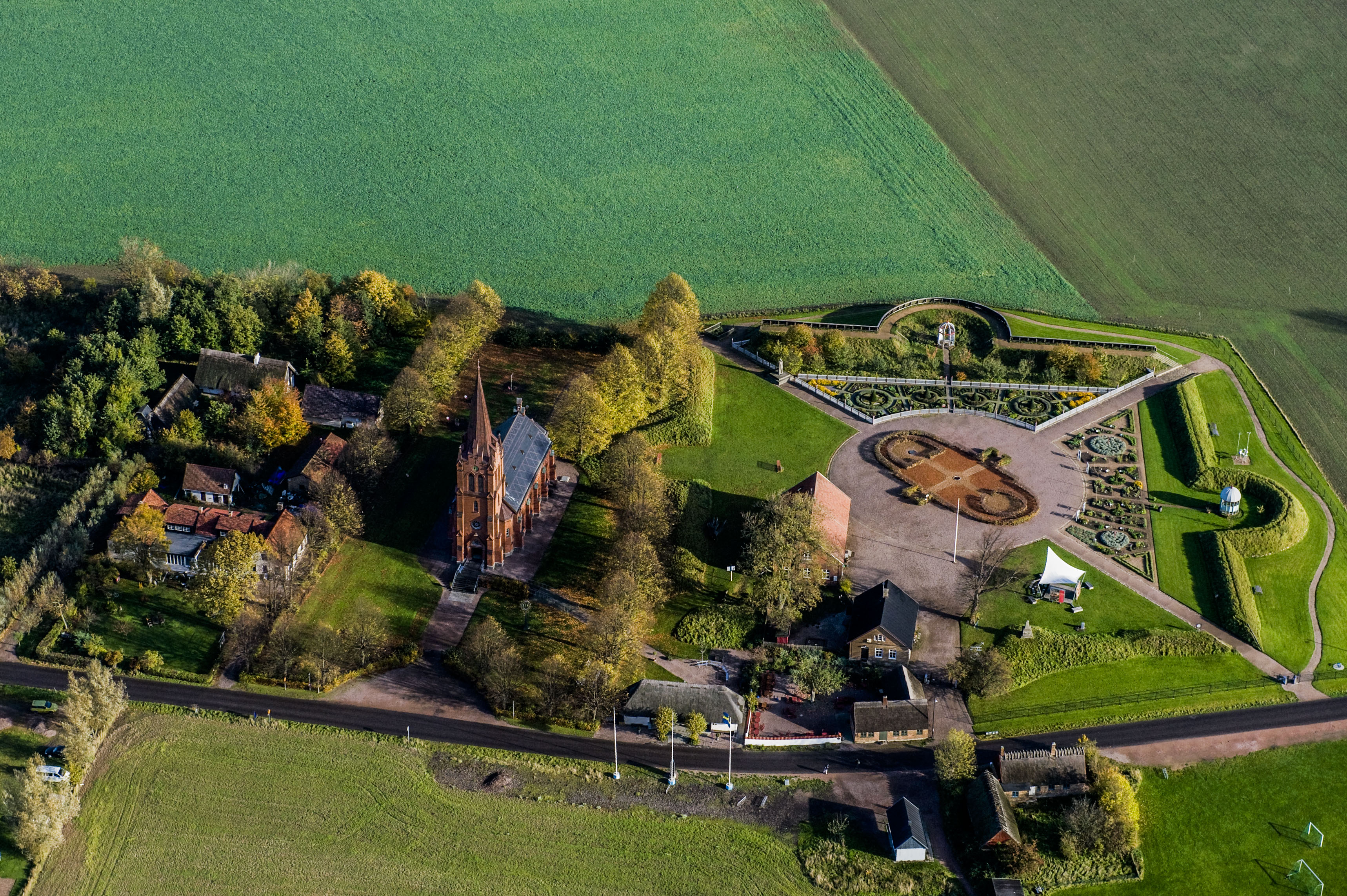 Uranienborg